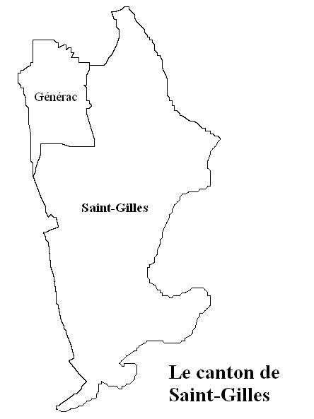 Le canton de Saint-Gilles Image personnelle